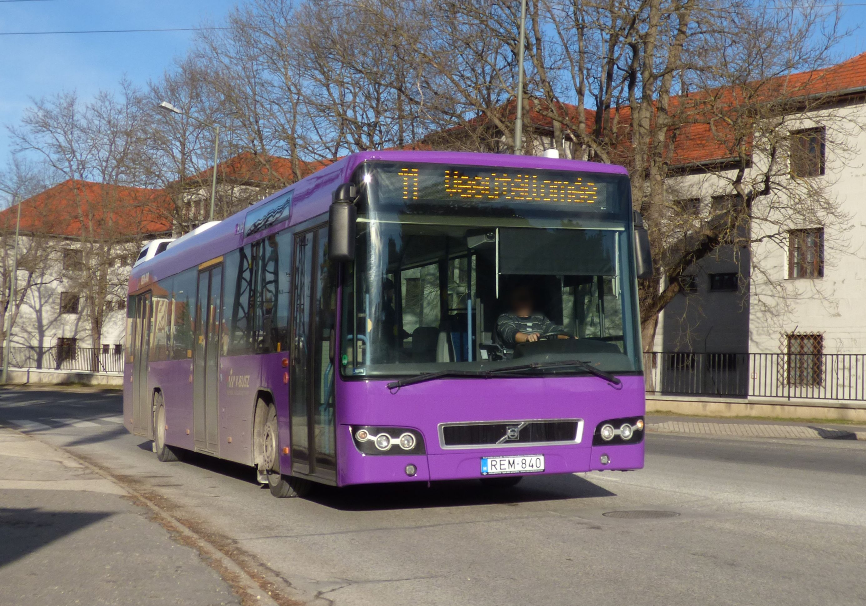 A V-Busz Kft. Volvo 7700-as típusú autóbusza a Jutasi úton a Laktanya előtt a veszprémi 11-es vonalon